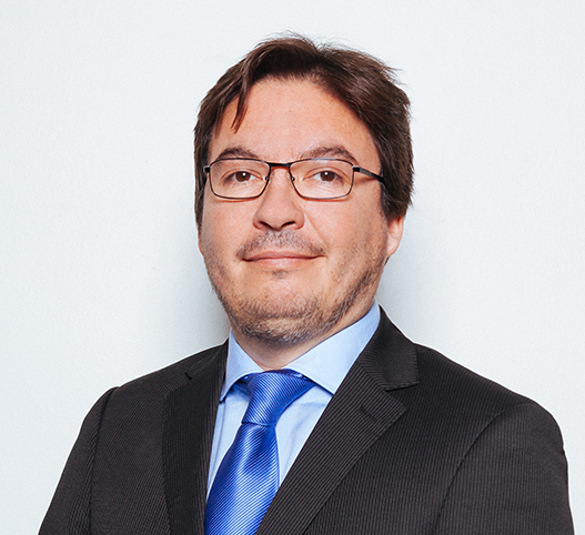 Marcos Barraza, político chileno